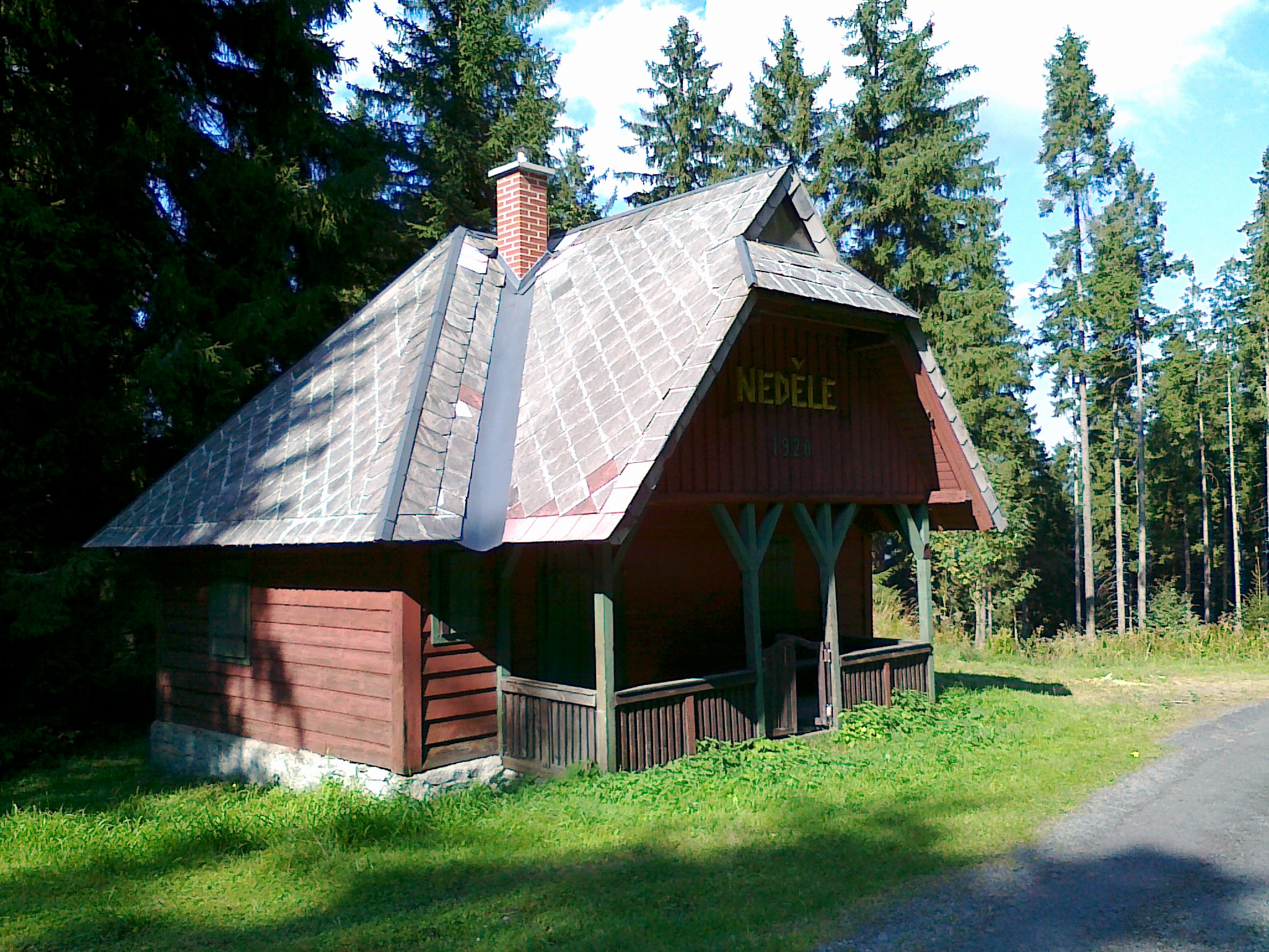 Chata Neděle na stoku góry Žárový vrch przy ścieżce Zámecká cesta